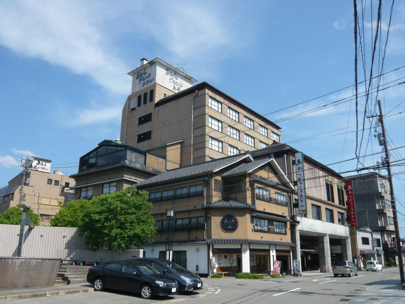 あわらグランドホテル